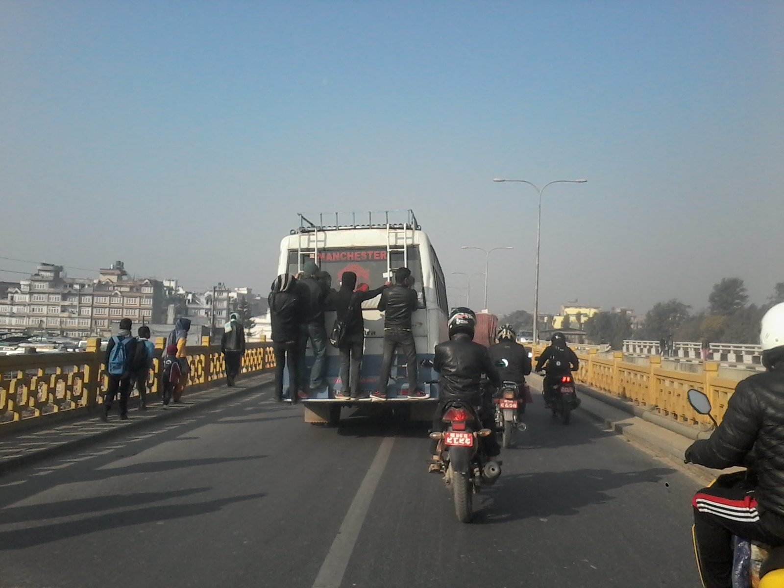 नेपाली: नेपालमा नाका बन्दीको असर